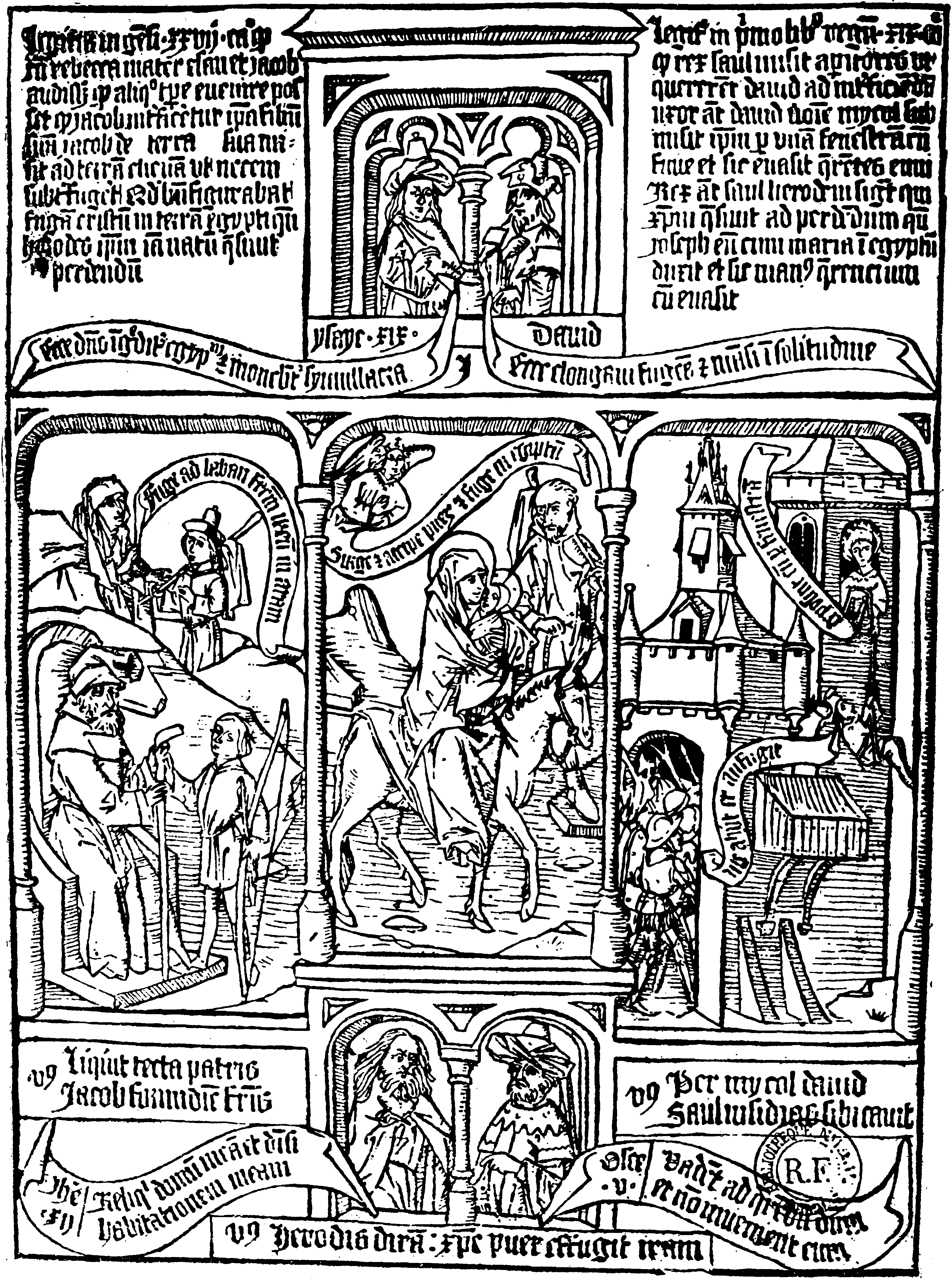 Rebecka sänder Jakob till Laban. Flykten till Egypten. Mikael hjälper David på flykten, 4 Kon. 11: 1.